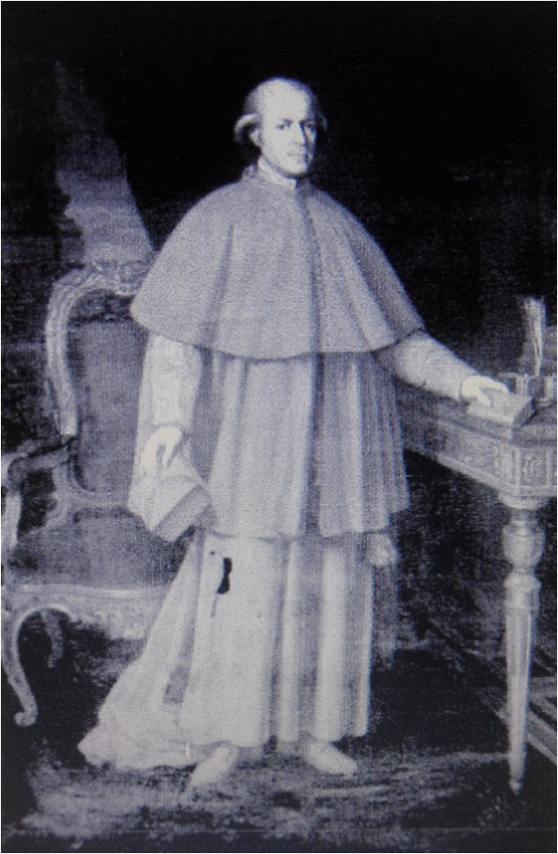 Retrato del cardenal Dionisio Bardají y Azara